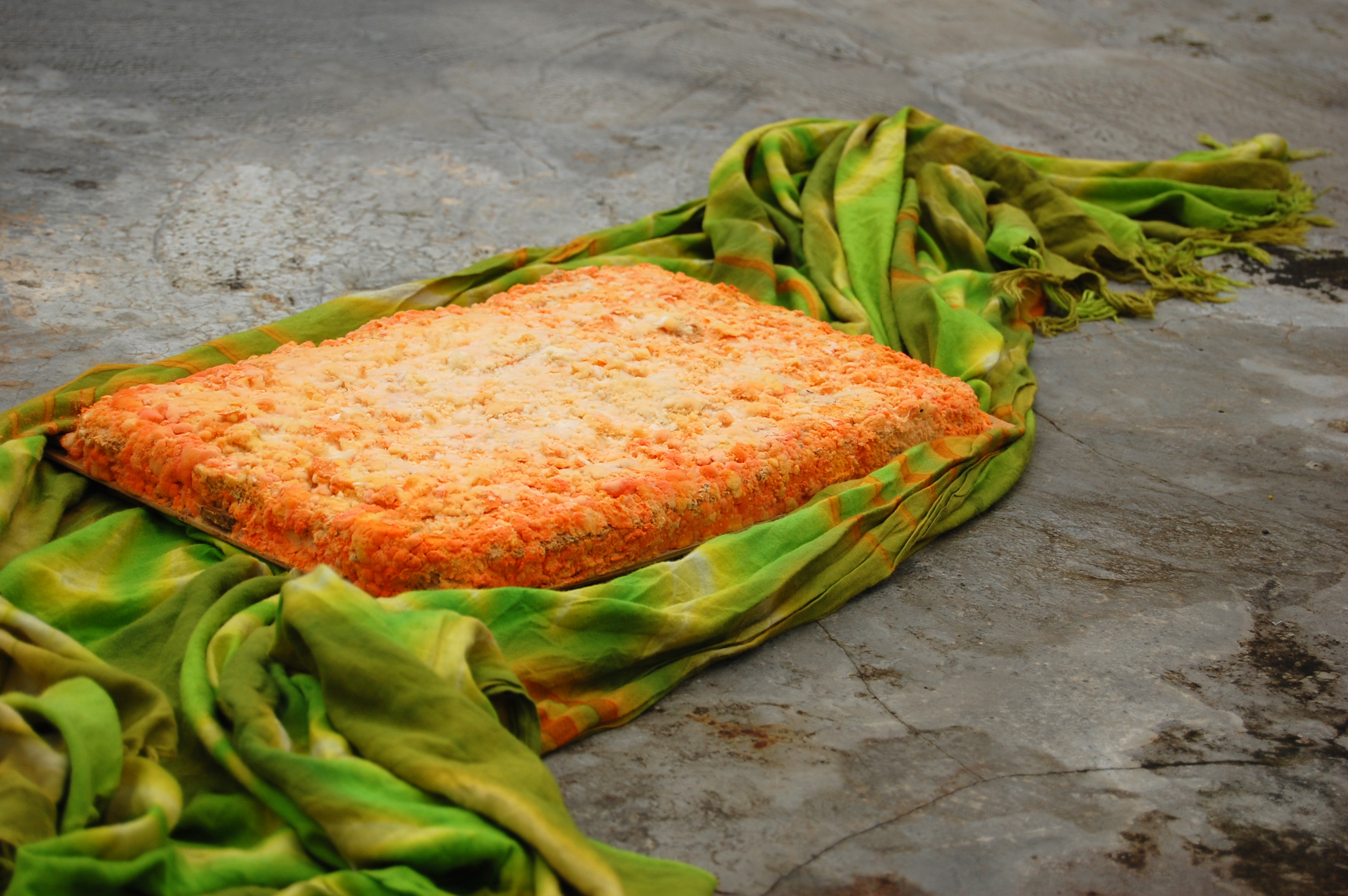 oncom